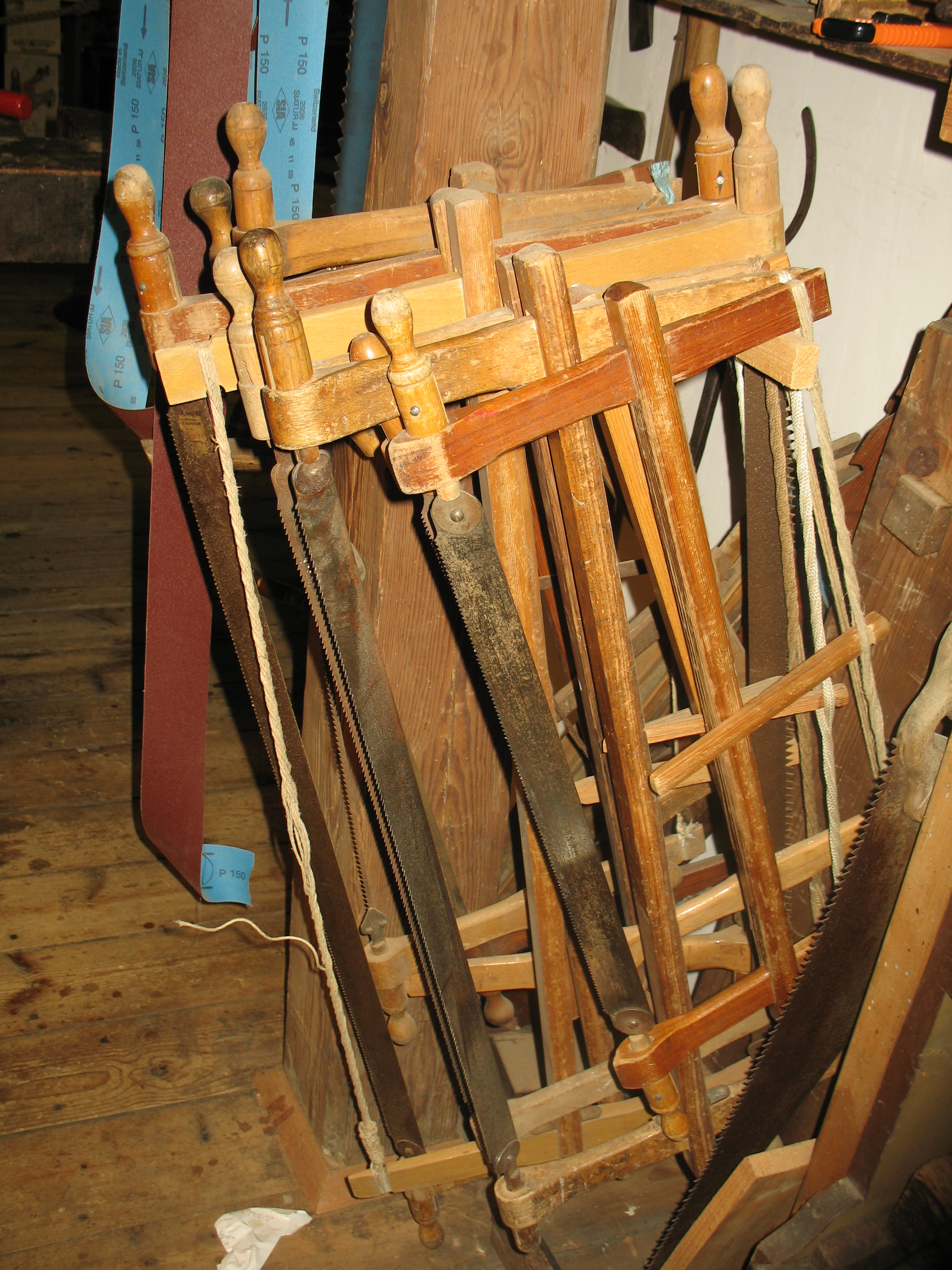 Armsave fra Roskilde Værktøjsmuseum.